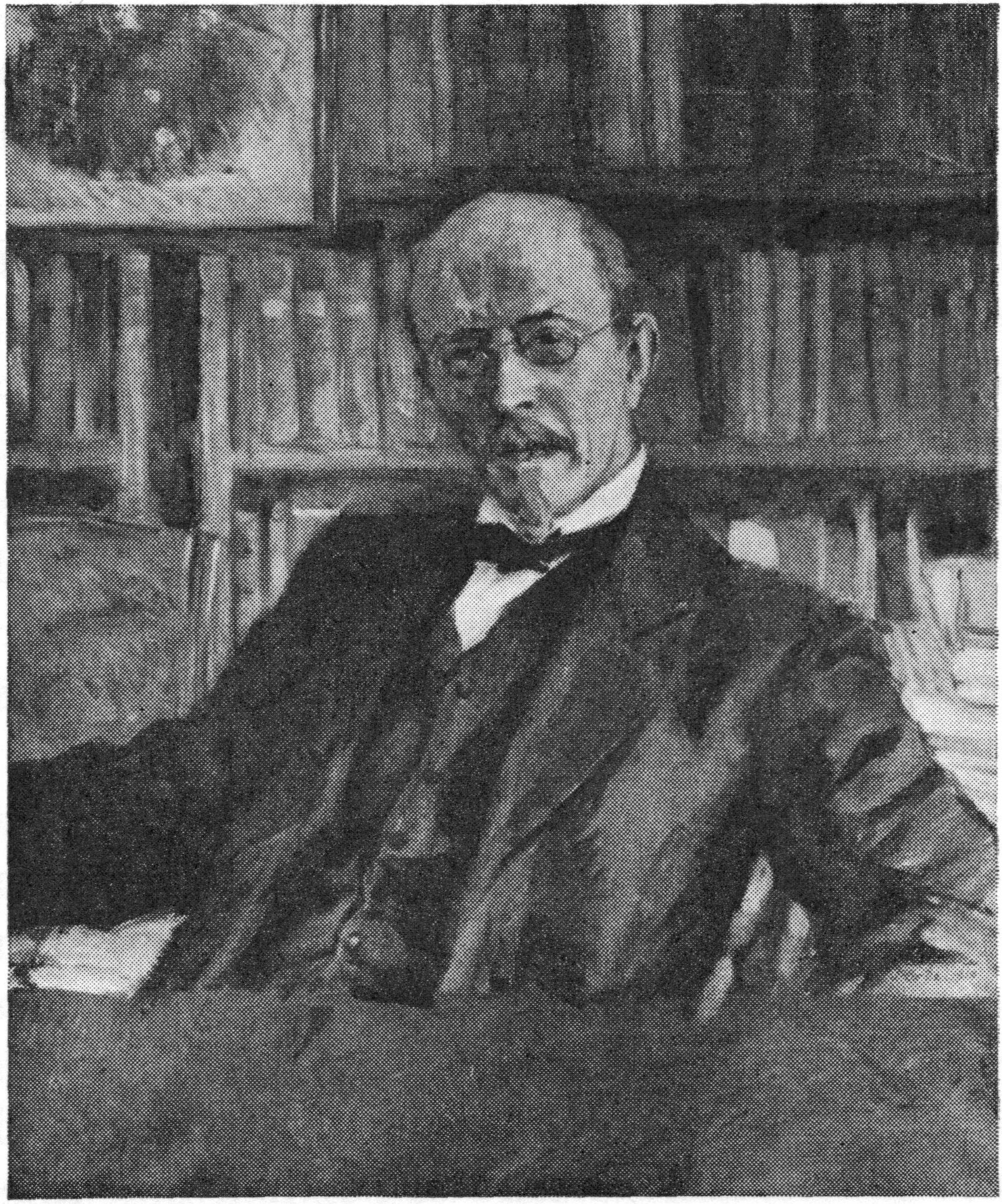 Hjalmar Christensen malt av Lars Jorde.